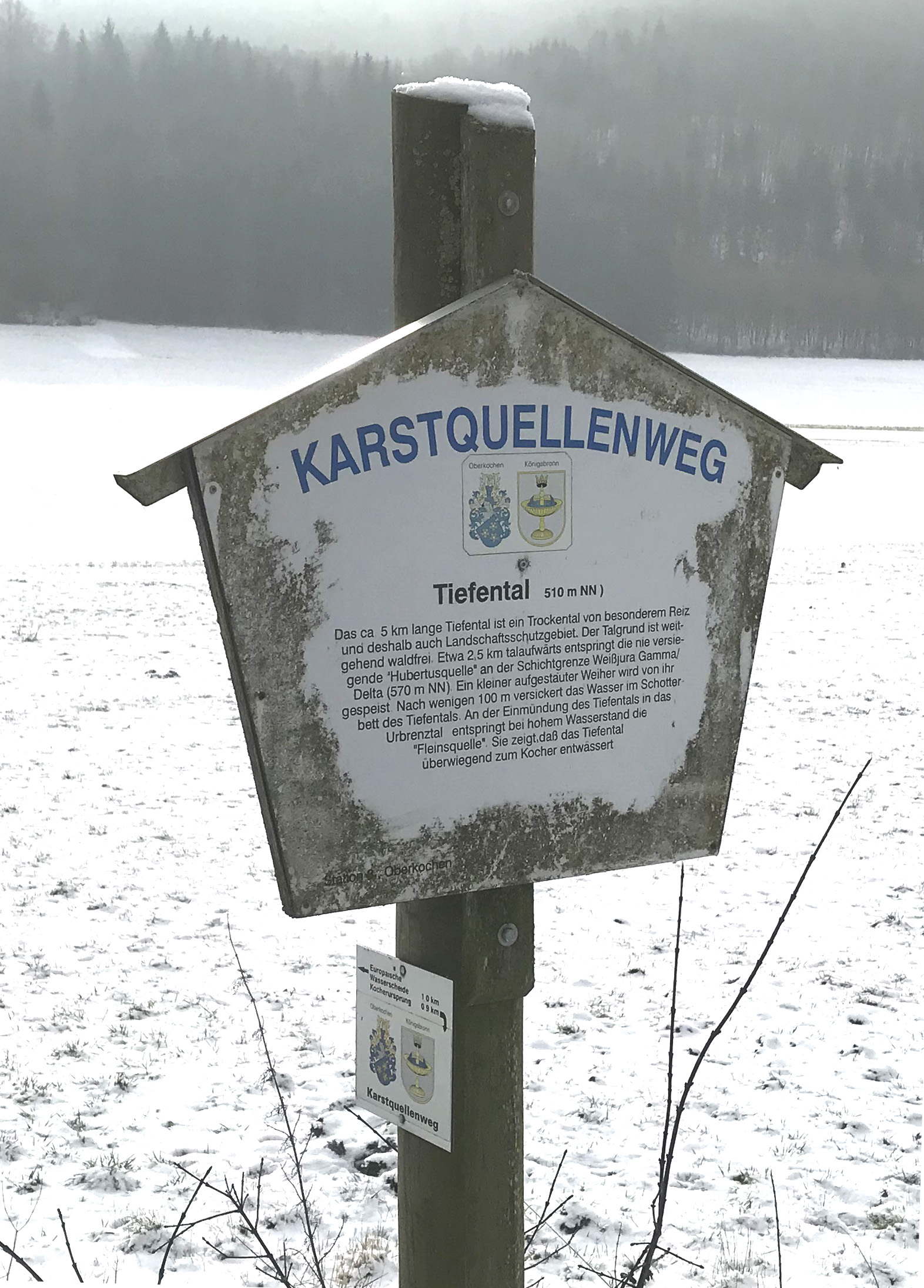 Die Informationstafeln und die Wegweiserschilder sind an den Wappen von Oberkochen und Königsbronn wiederzuerkennen.